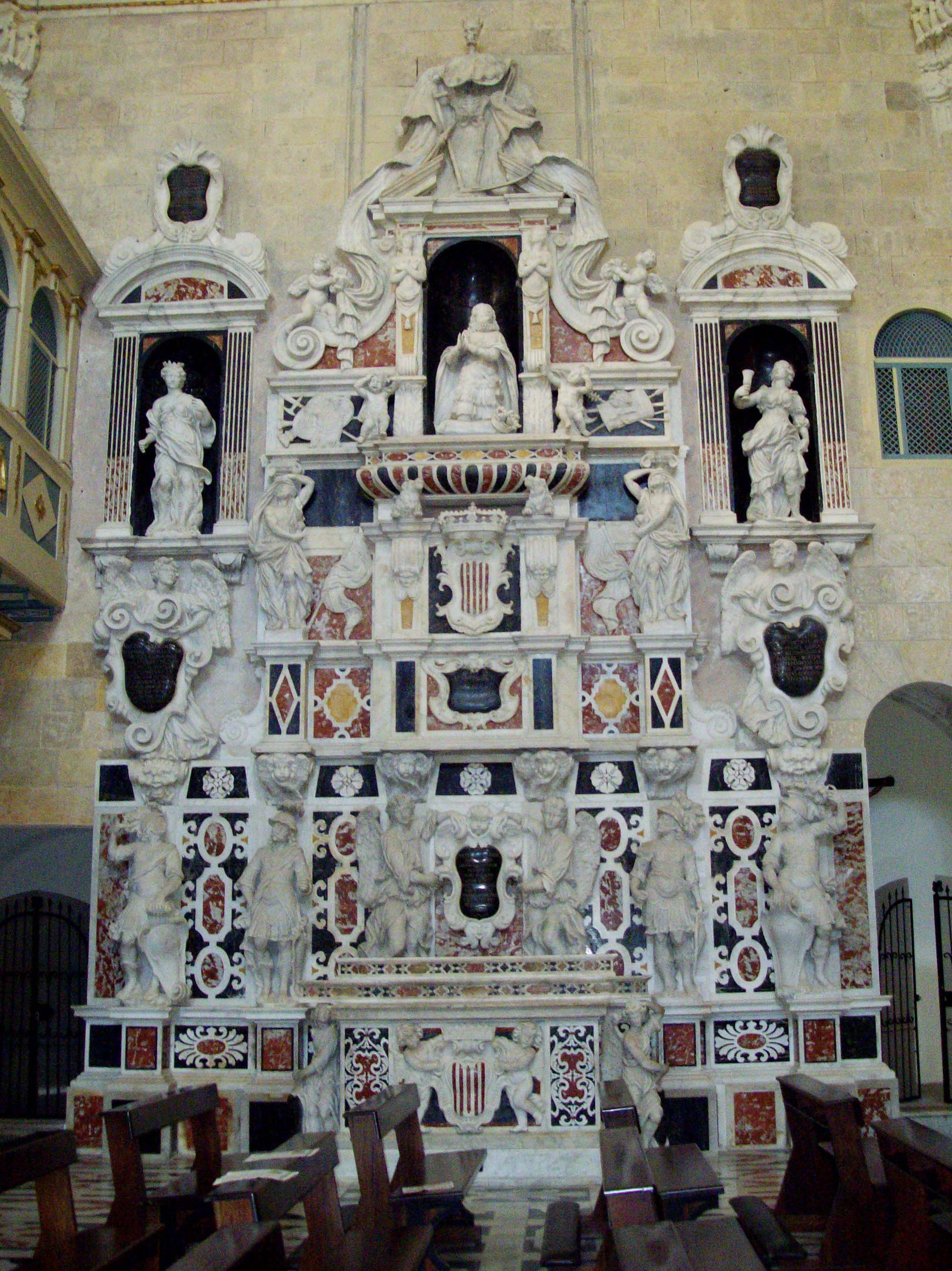 Mausoleo di Martino il Giovane (XVII secolo) - Duomo di Cagliari